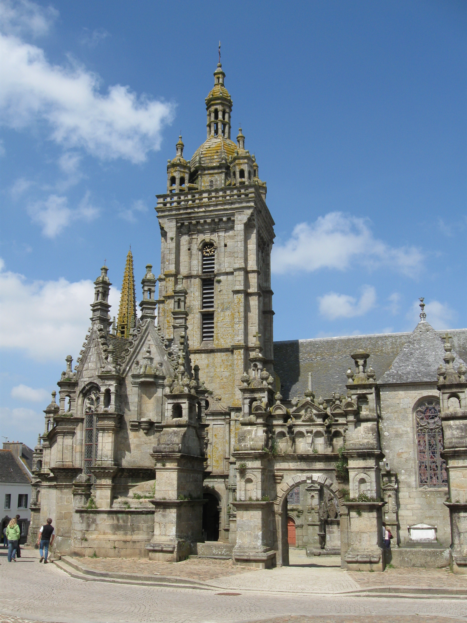 Saint Thegonnec, 10 km südwestlich Morlaix, Finistere, Bretagne